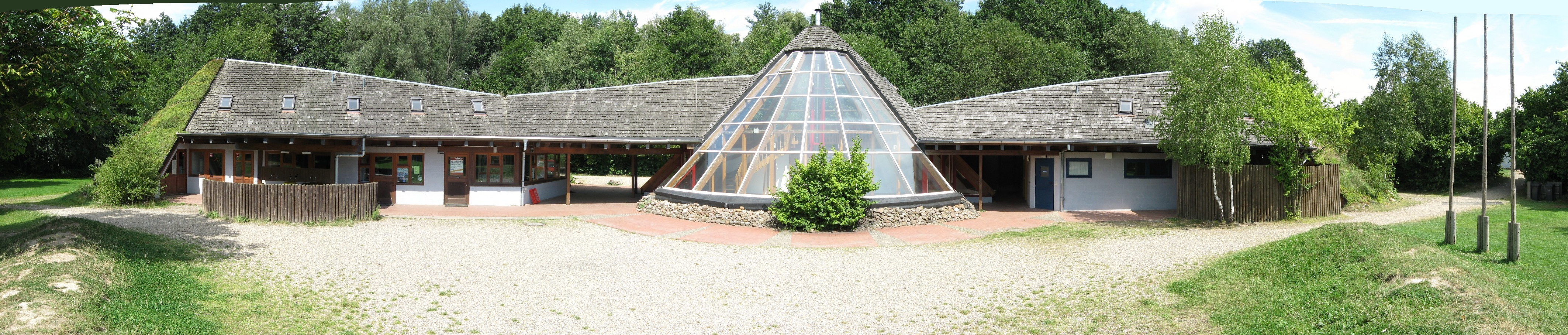 Das Haupt- und Wirtschaftsgebäude des Jugendzeltplatzes Almke bei Wolfsburg, der Rundling